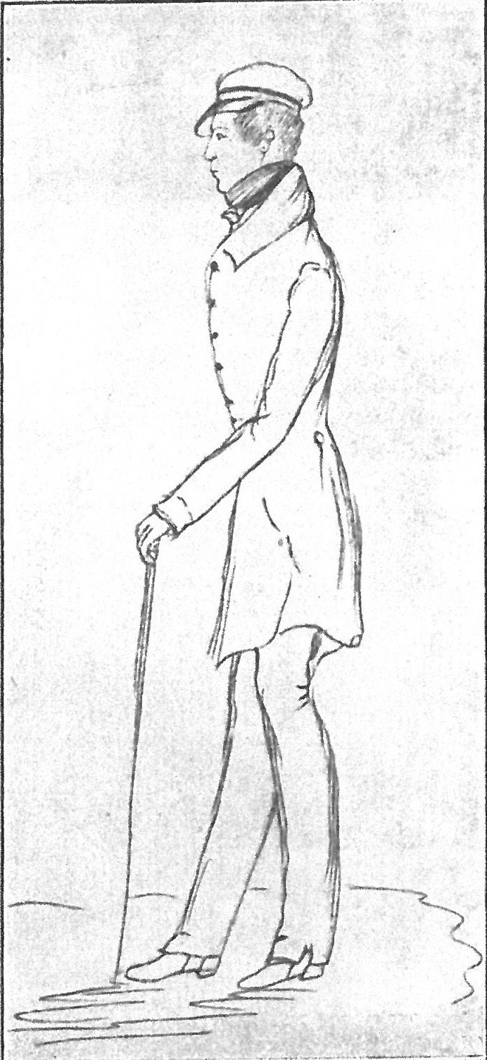 Porträt Otto von Bismarcks als Corpsstudent in Göttingen 1832/33 gezeichnet von Gustav Scharlach (1811-1881), Geheimer Regierungsrat und Amtshauptmann in Münden.